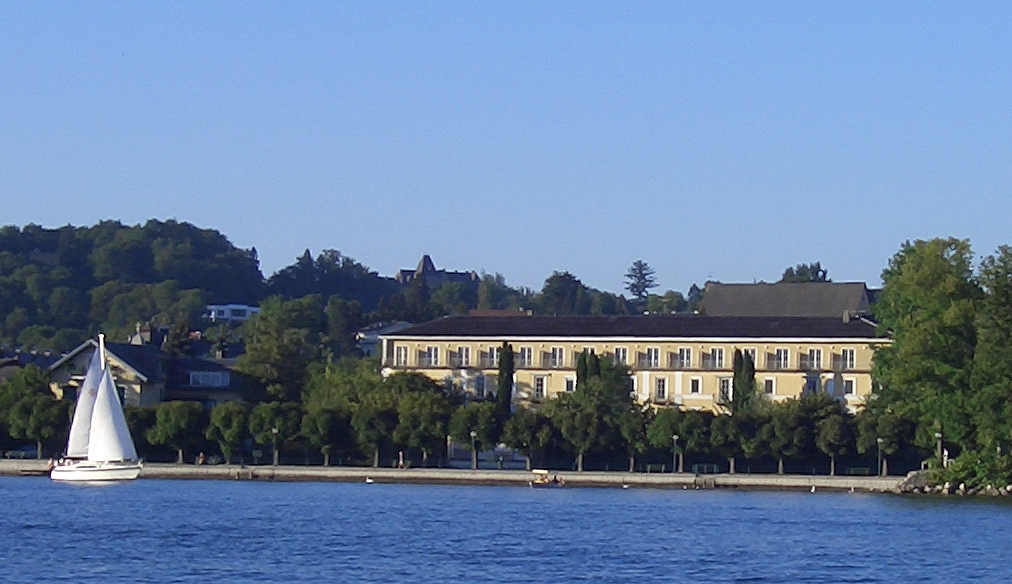 (ehemaliges) Parkhotel an der Gmundner ‚Schiffs lände‘